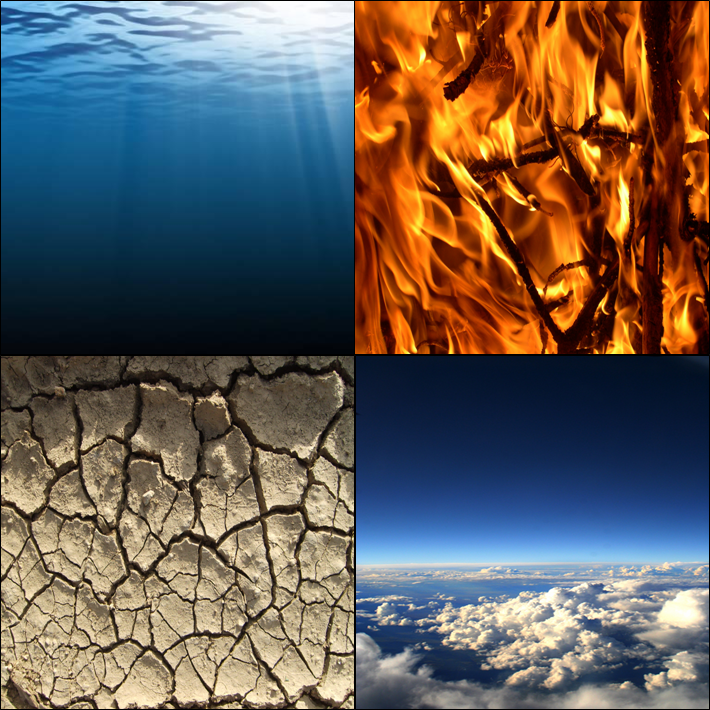 plaatje voor nieuw boek